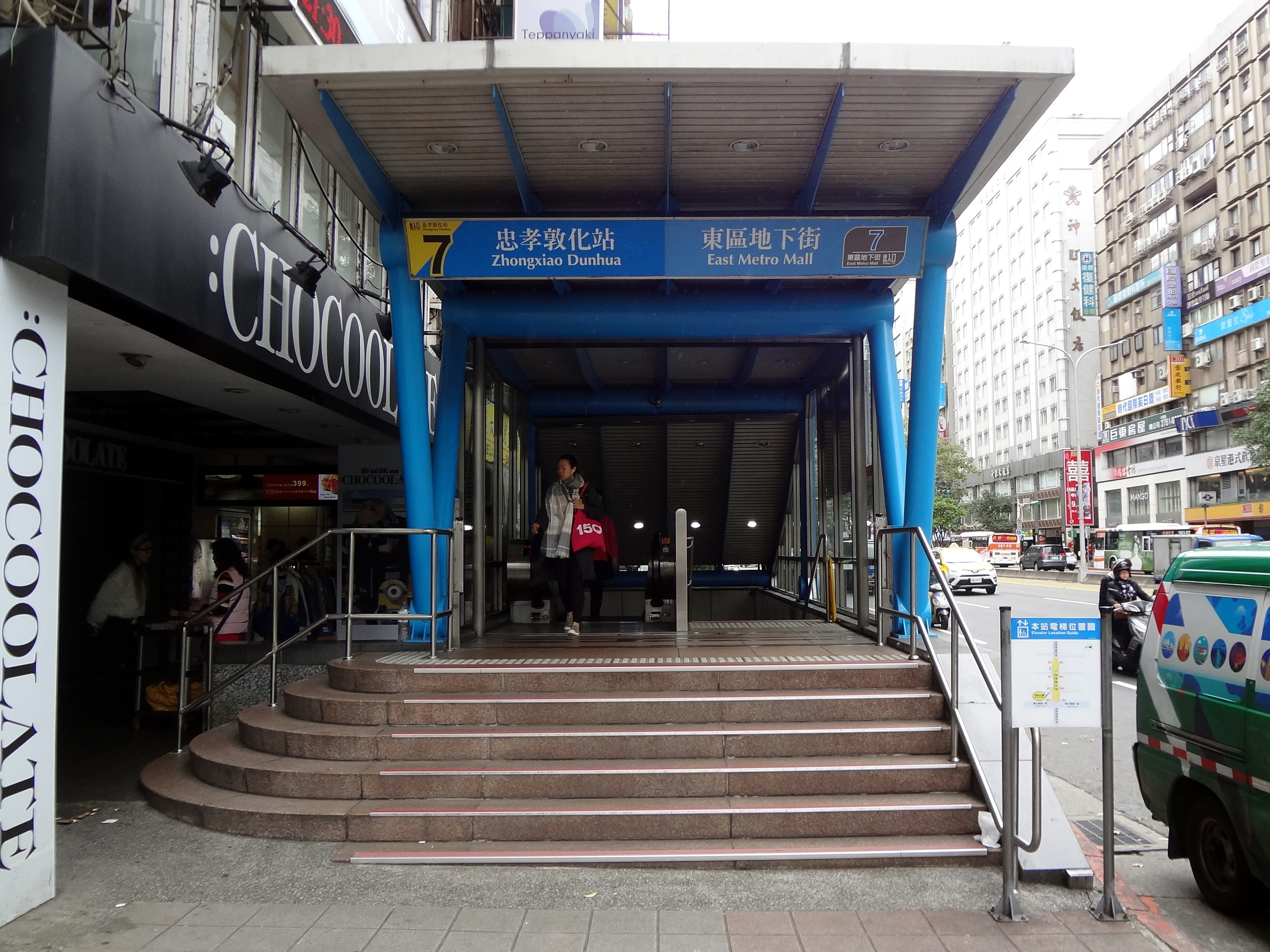 臺北捷運忠孝敦化站與東區地下街7號出口。